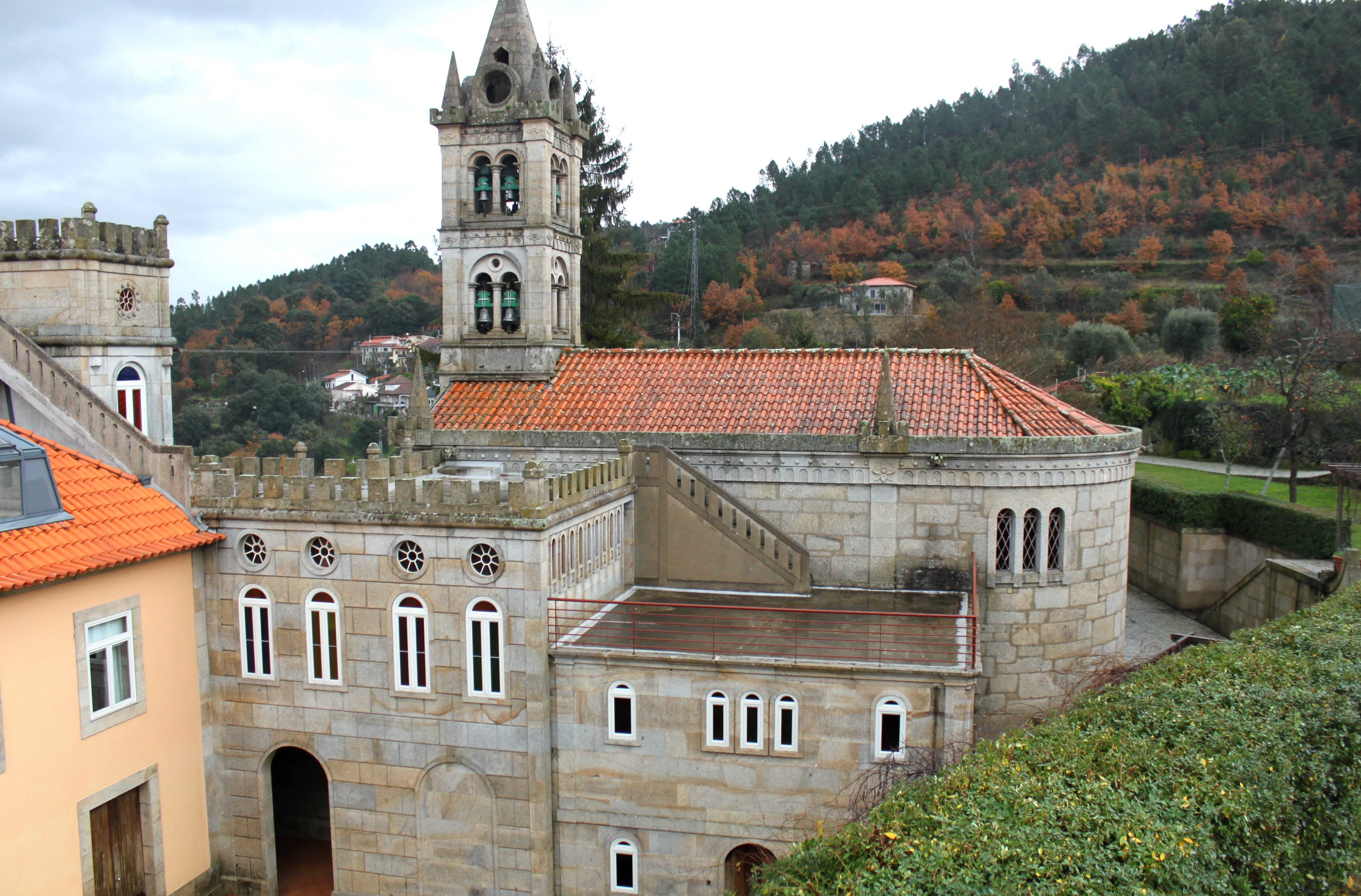 Casa da Calçada - Exterior